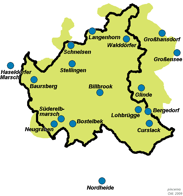 Wasserversorgung in Hamburg: Die Grafik zeigt die Standorte der 17 Wasserwerke in und um Hamburg, die die Stadt und umliegende Gebiete versorgen. Das Versorgungsgebiet (grüngelb) liegt auch außerhalb der Stadtgrenzen, so dass zu den Hamburger 755 Quadratkilometern noch etwa 250 Quadratkilometer weitere hinzukommen. Stand: Oktober 2009